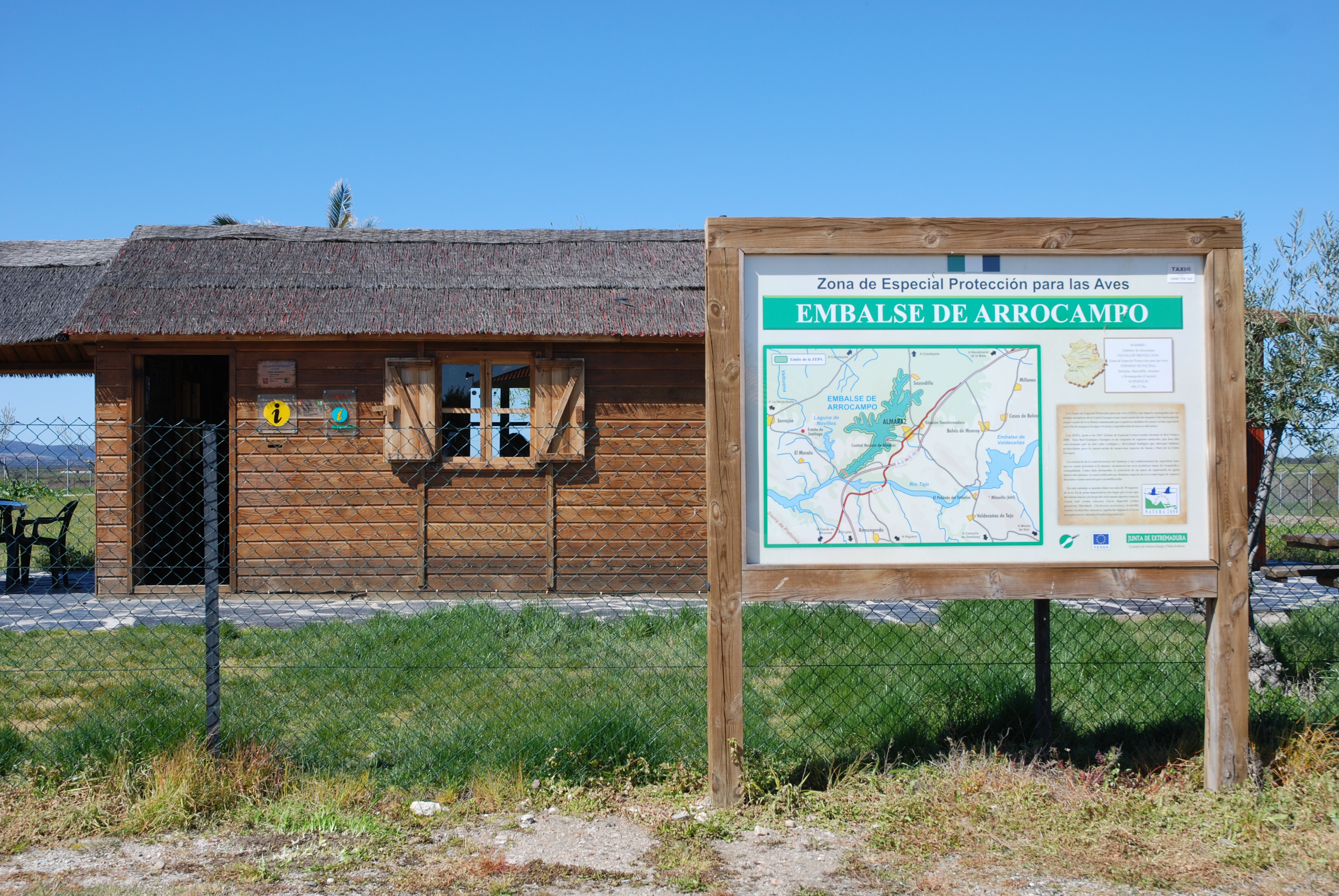 Oficina de información de la ZEPA Embalse de Arrocampo, en el municipio de Saucedilla (Cáceres)